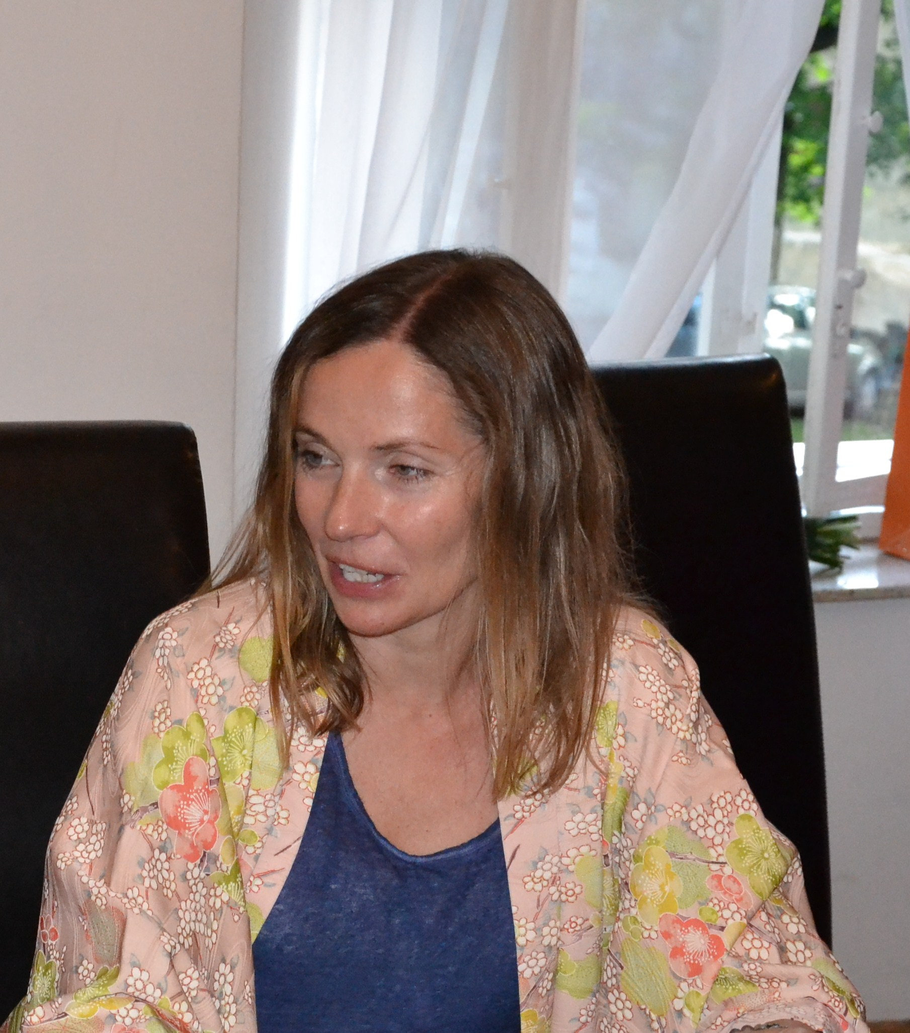 Joanna Bator w Nowej Rudzie, 9.07.2015